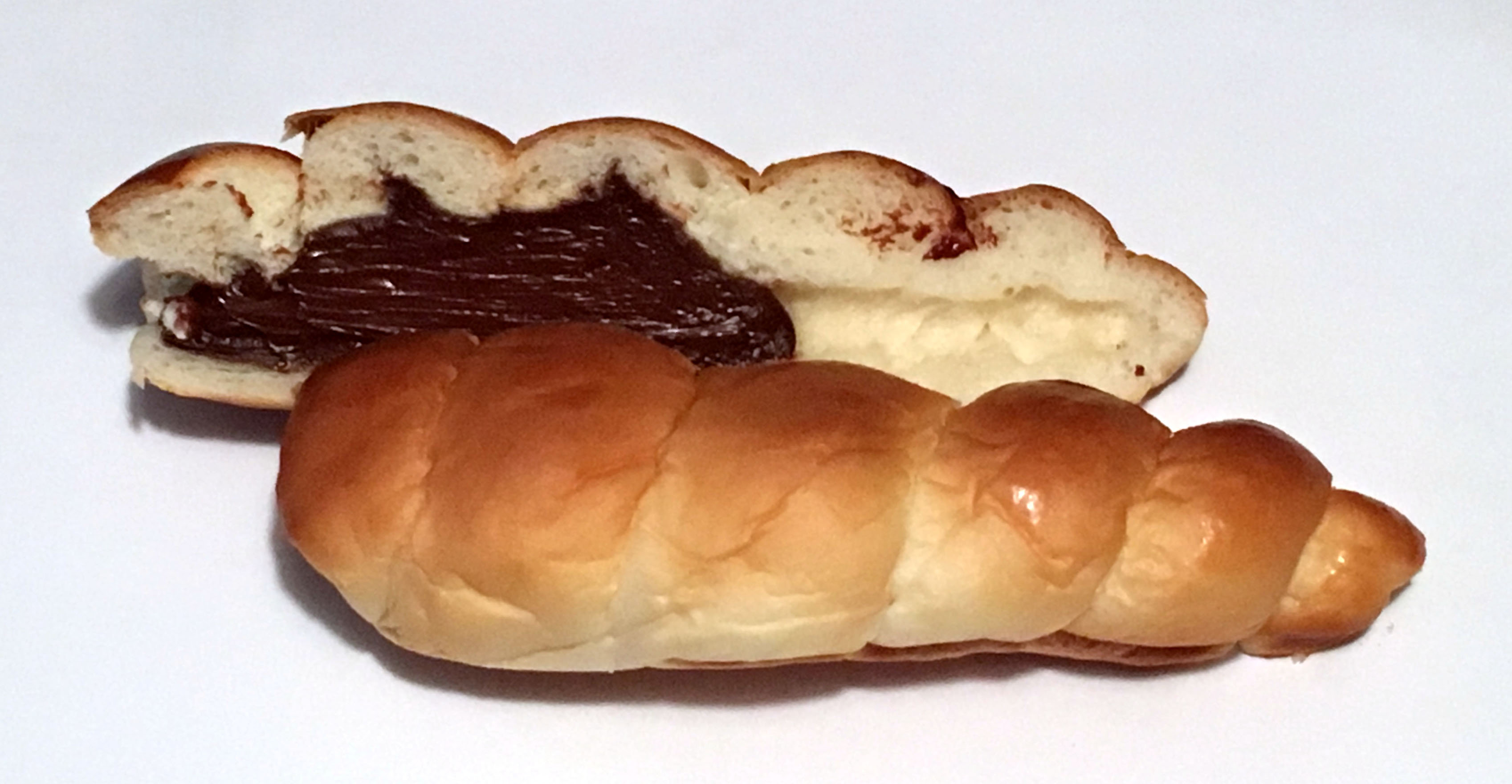 神戸屋のチョココロネ